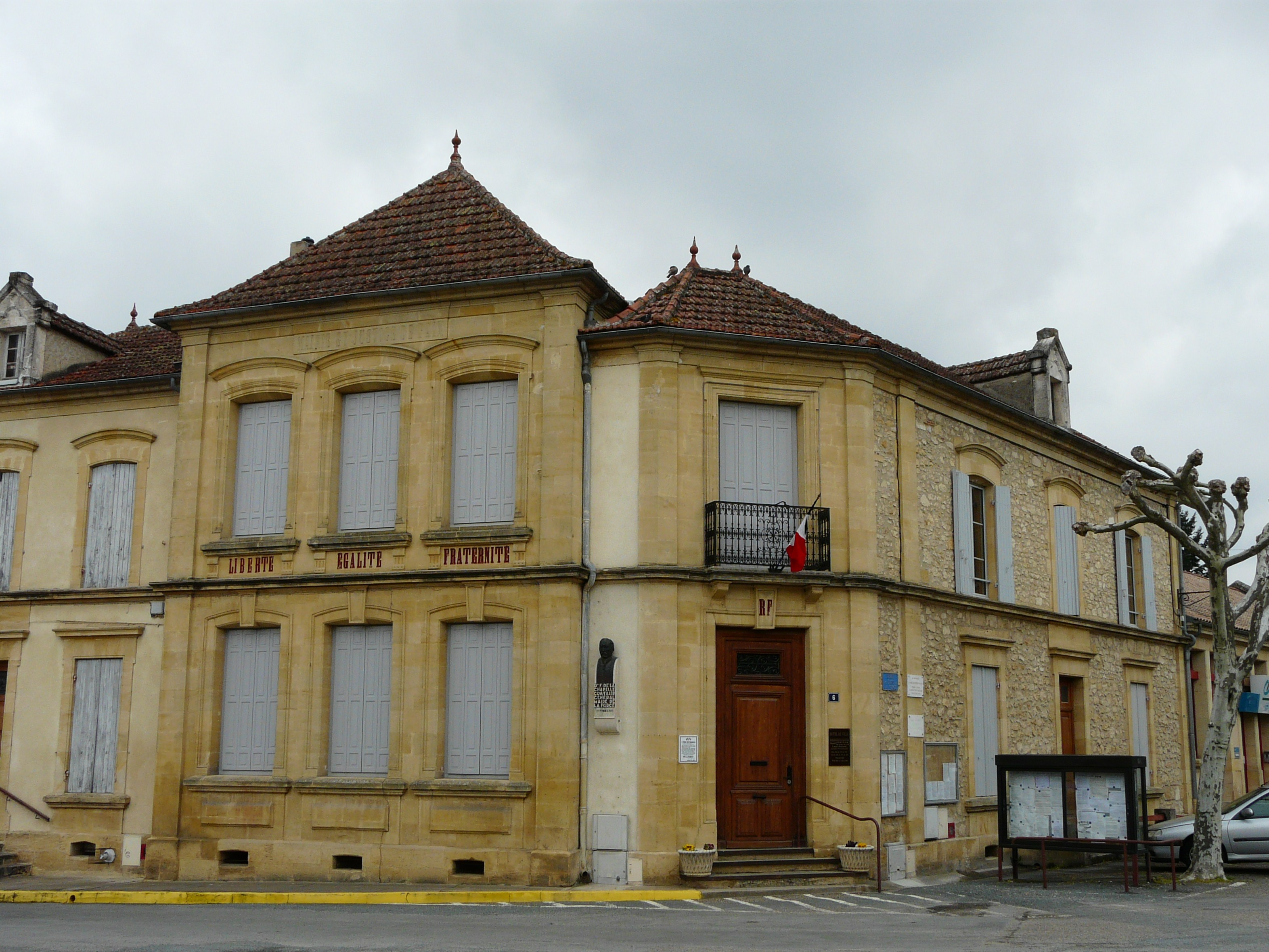 La mairie de La Force, Dordogne, France.